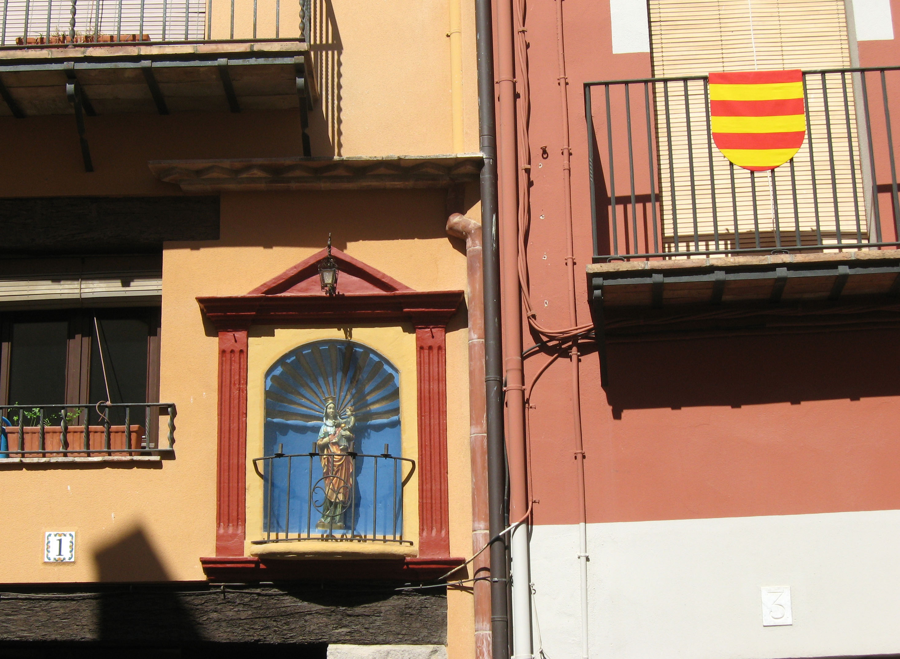 Marienverehrung in Castelló d’Empúries Datum: 12.09.2010 Urheber: Michael Pfeiffer alias Benutzer:Gordito1869 Quelle: Privates Fotoarchiv des Urhebers